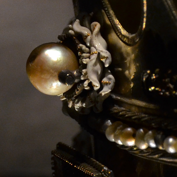 Detail of a natural pearl on the crown of Margaret of York ( made in London before 1461 ). Aachen Cathedral treasury.